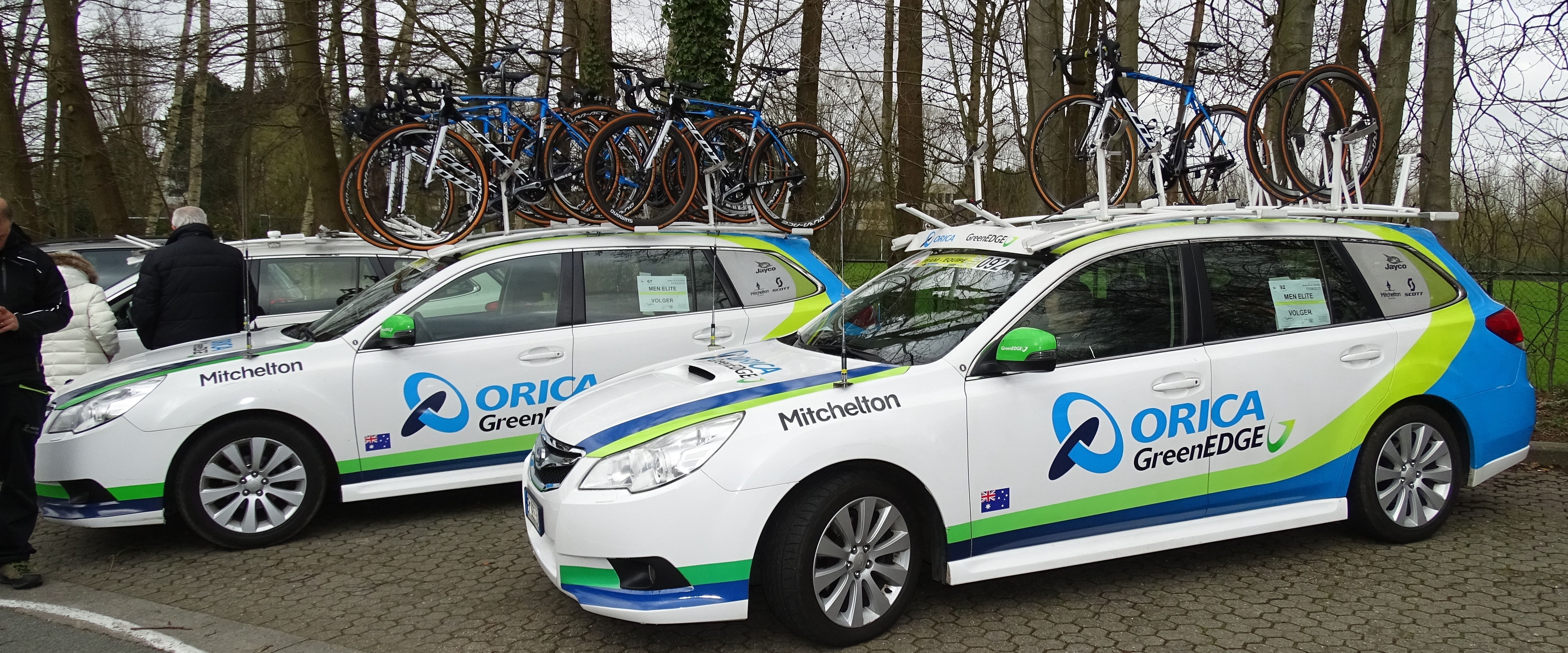 Reportage réalisé le mercredi 1er avril à l'occasion du départ de la deuxième étape des Trois jours de La Panne 2015 à Zottegem, Belgique.